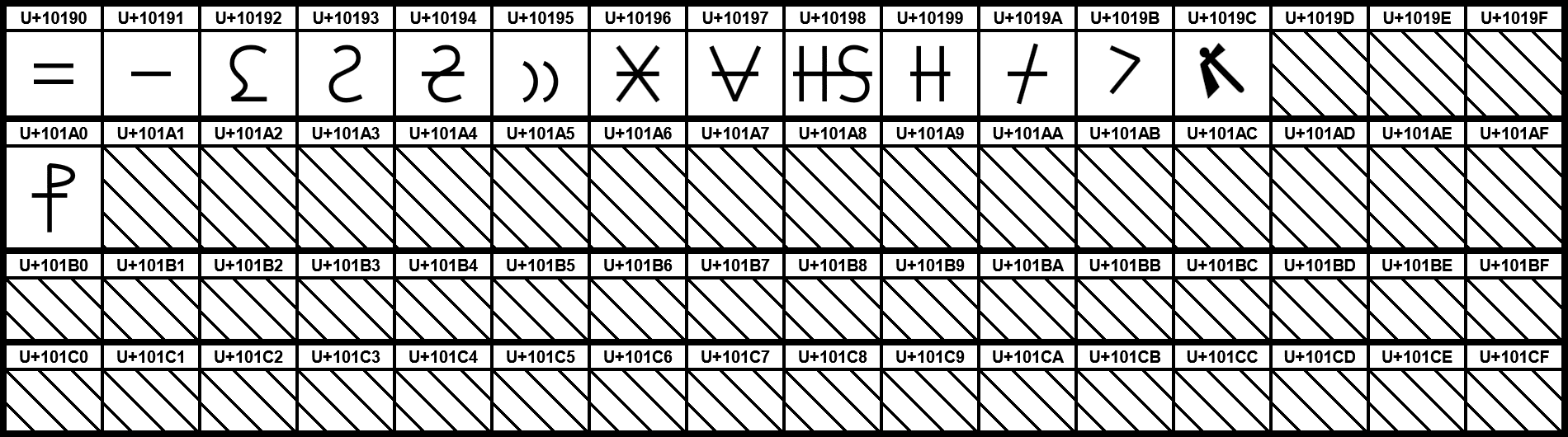 Grafiktafel für den Unicodeblock Alte Symbole. Schraffierte Felder sind unbesetzte Codepoints.